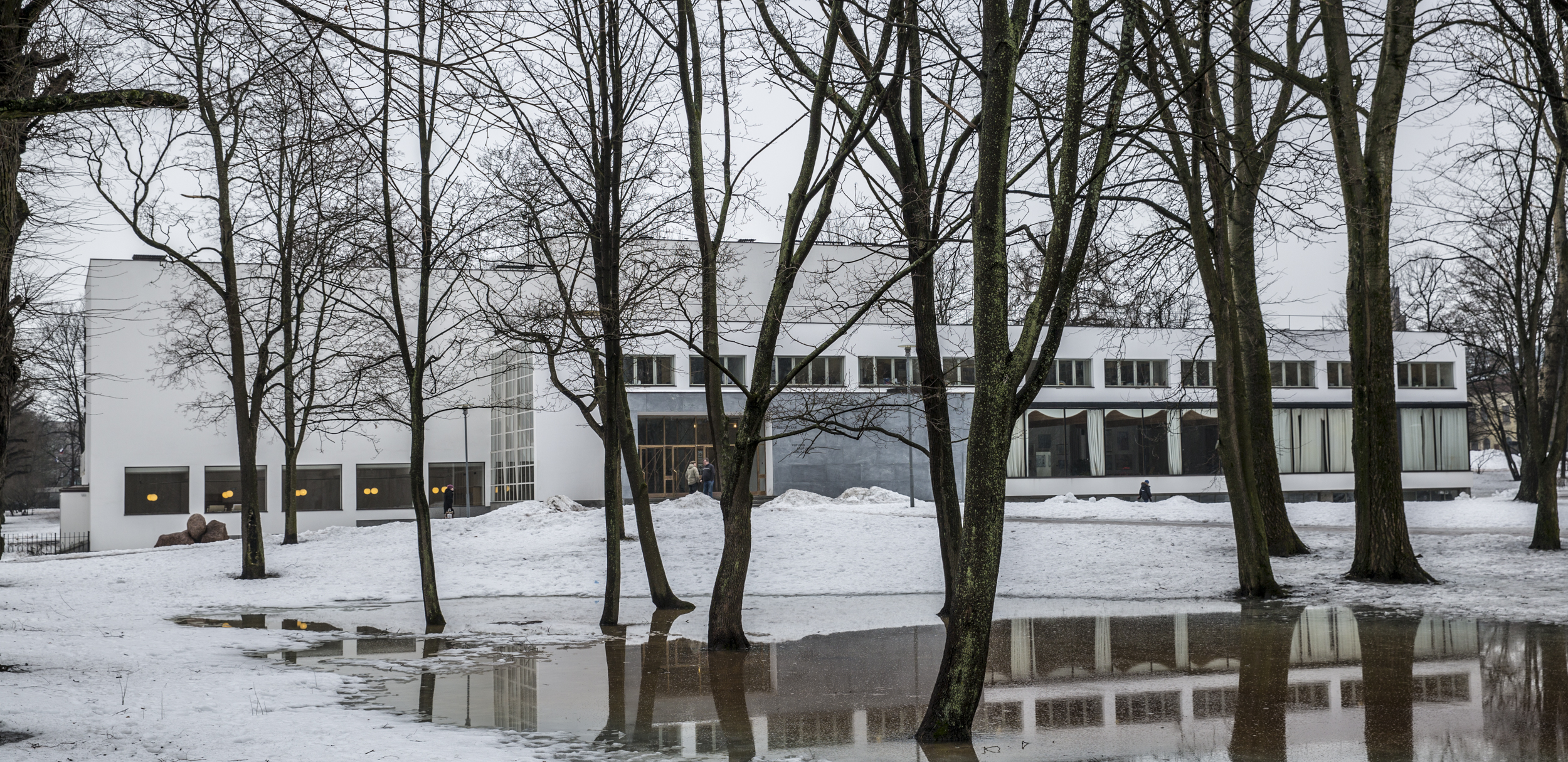 Alvar Aallon kirjasto Viipuri